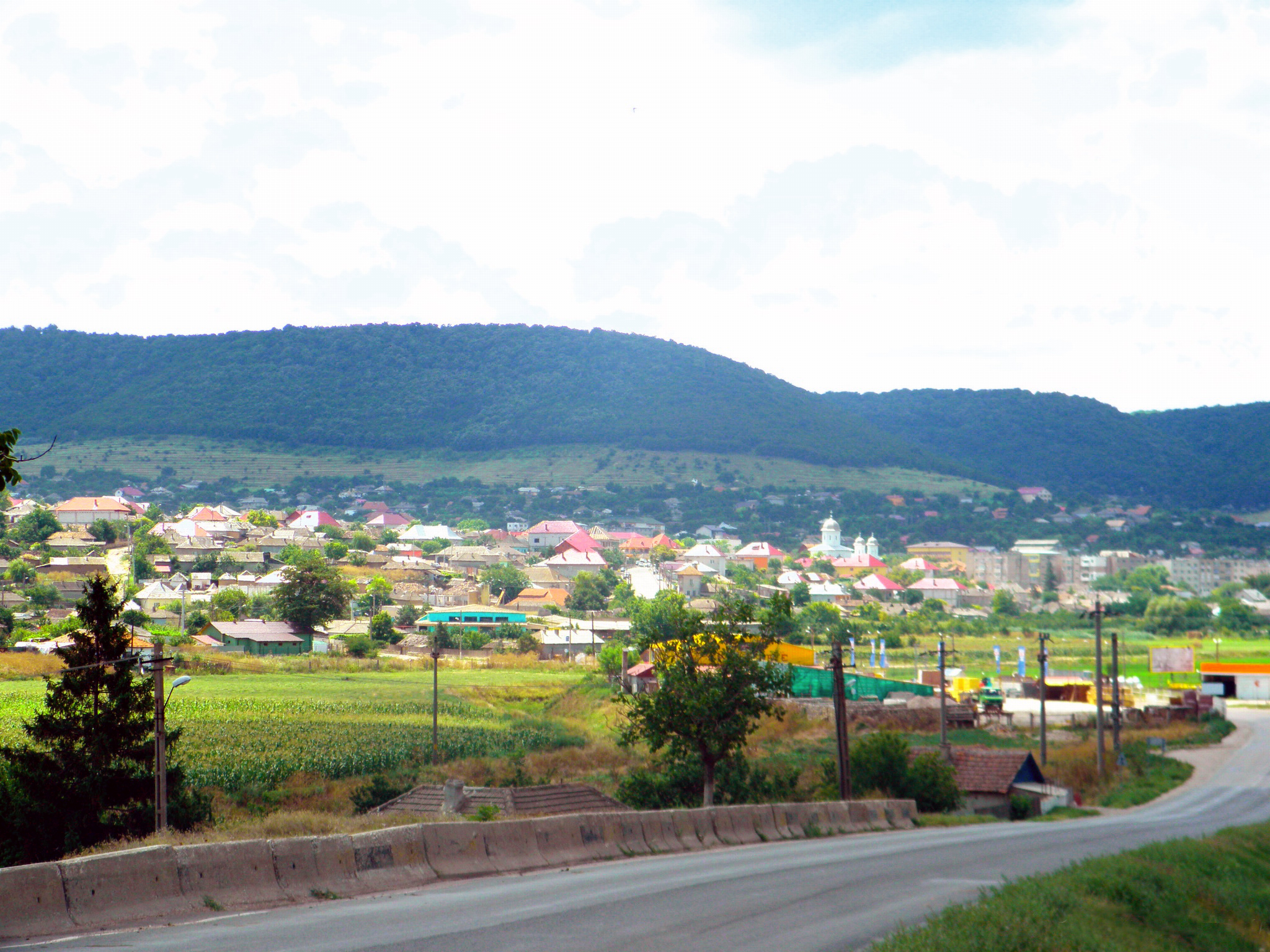 Badadag